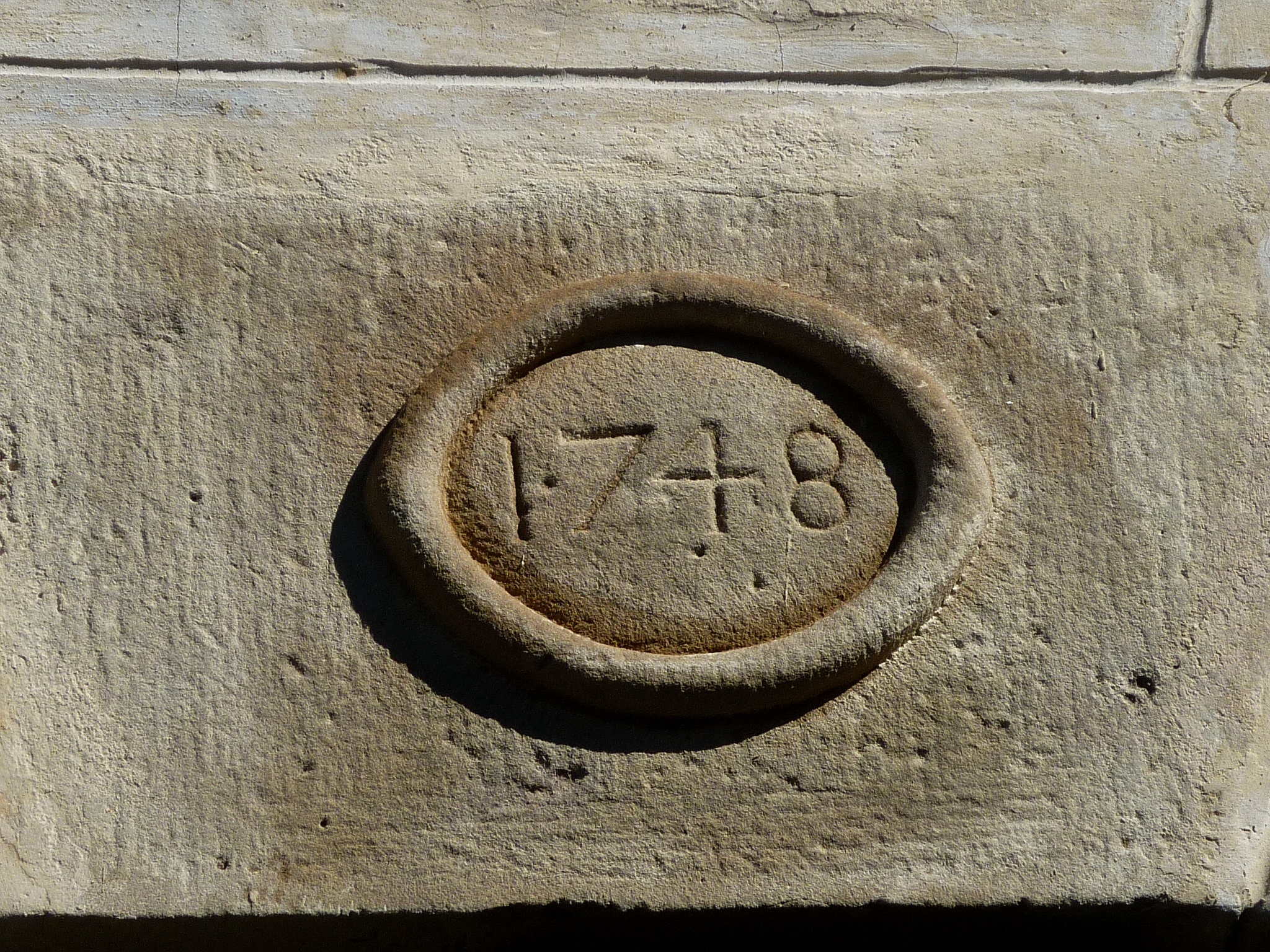 Mas de Viladrosa (Biosca): inscripció a la llinda de la capella